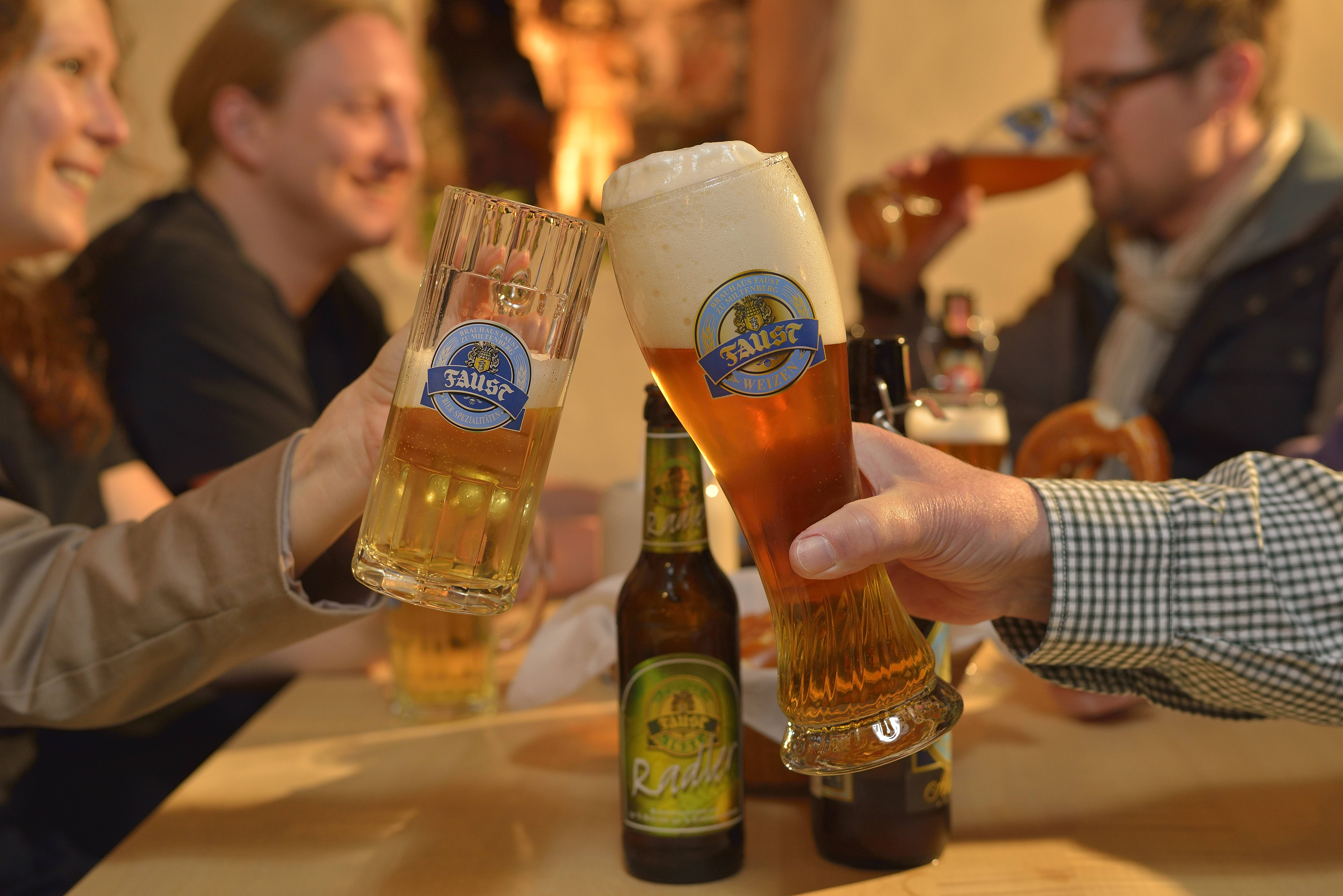 Jährlich besuchen rund 16.000 Besucher das Brauhaus Faust in Miltenberg.